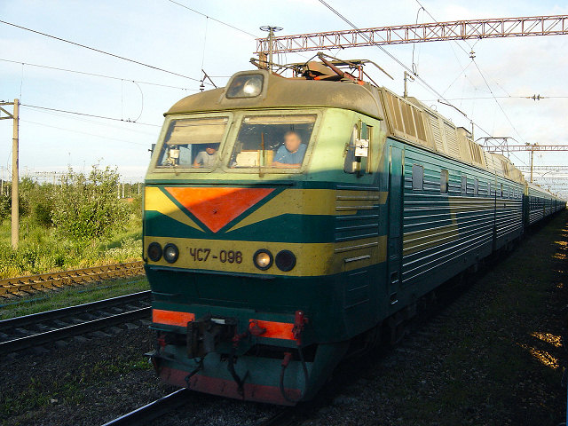 Russische Elektrische locomotief. Eigen foto Mark Voorendt, juni 2005. (De machinist is onherkenbaar gemaakt) categorie:Afbeelding trein